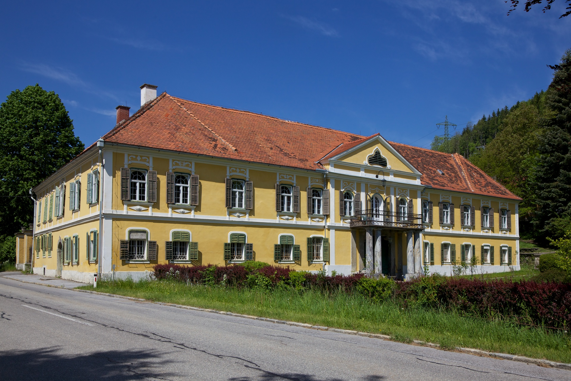 Ehem. Hammerherrenhaus, sogen. Goldschmiedschlössl